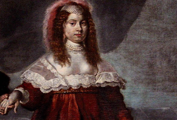 Regitze Grubbe (1618-1689) (detail)